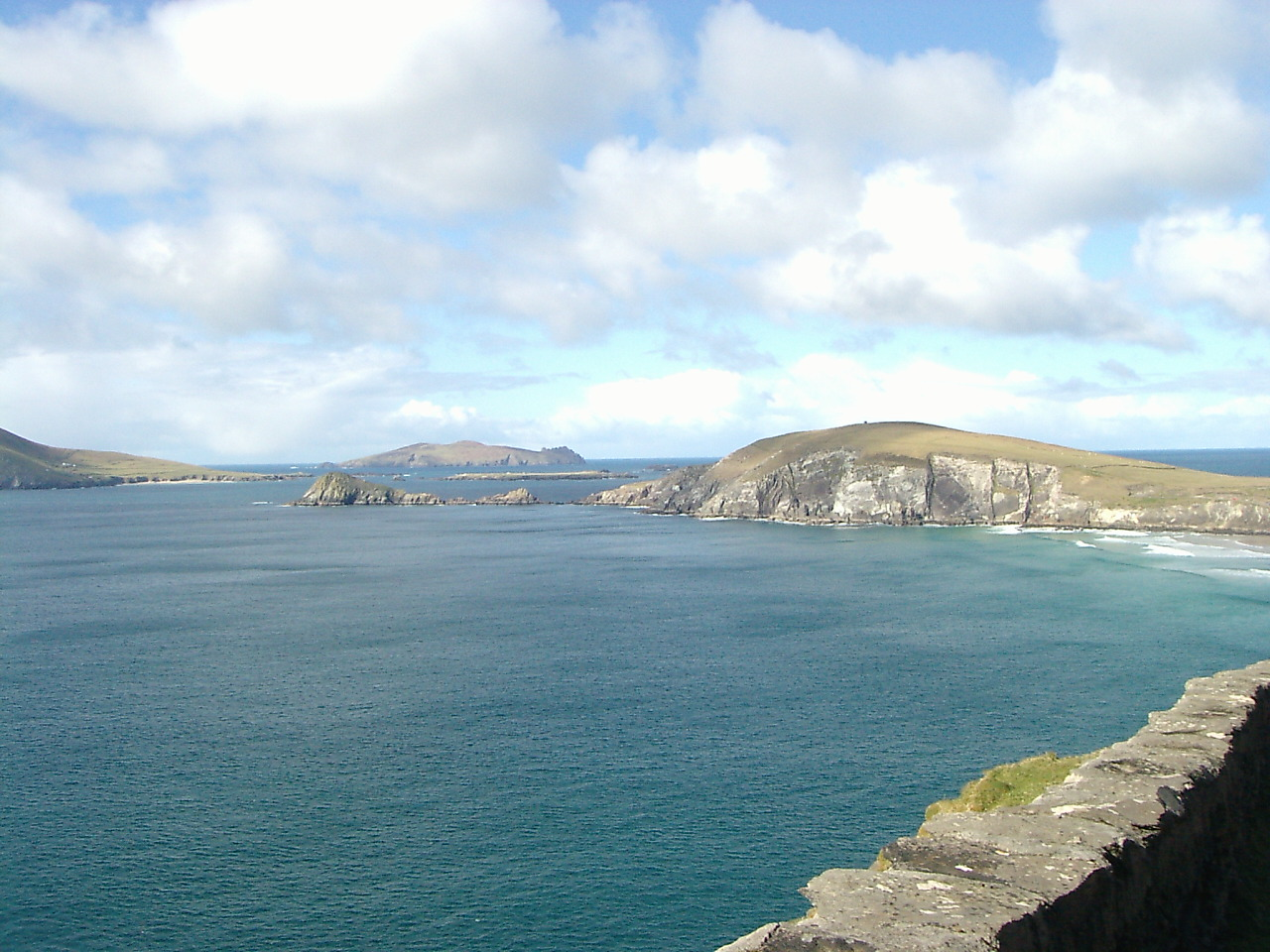 Dingle's uiterste westpunt, het verste westpunt van Ierland